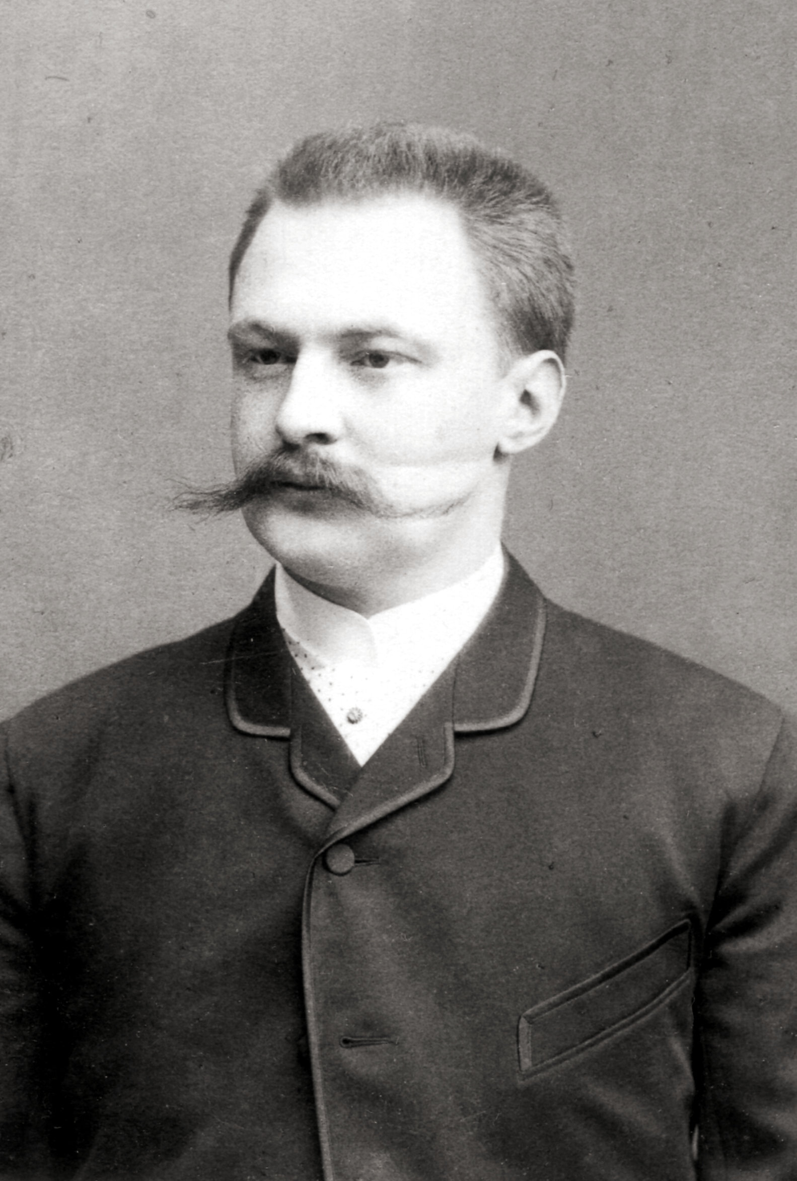 Porträtfotografie des bayerischen Richters Alfred Dürbig (1861–1930)